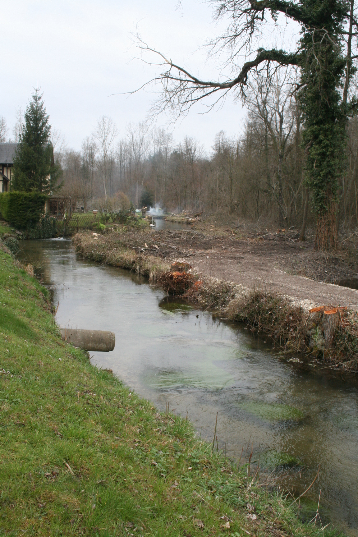 Picard: Ech rio L'échaut à Pont-d'Grès (Cotinchy, Sonme, Picardie)